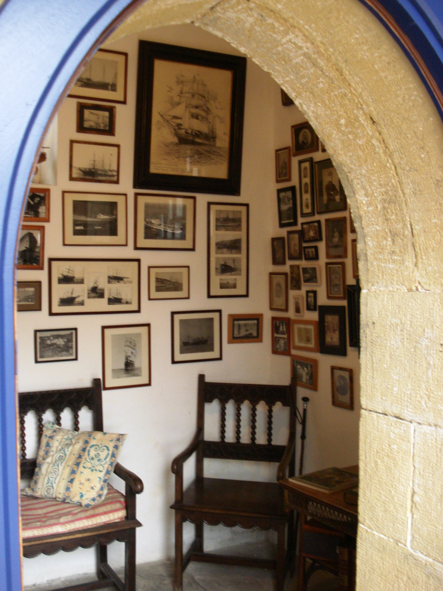 La Mauresque le musée Légasse 02